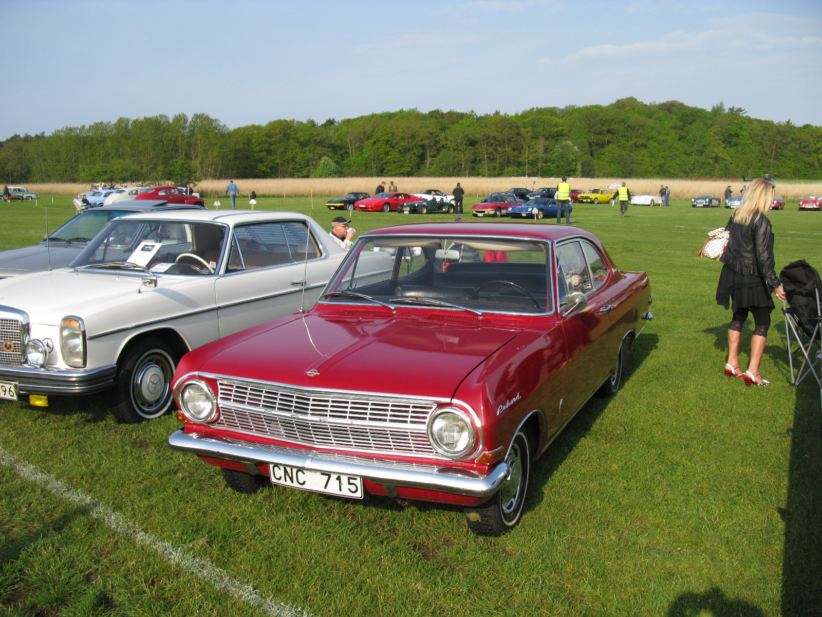 Opel Rekord Coupé